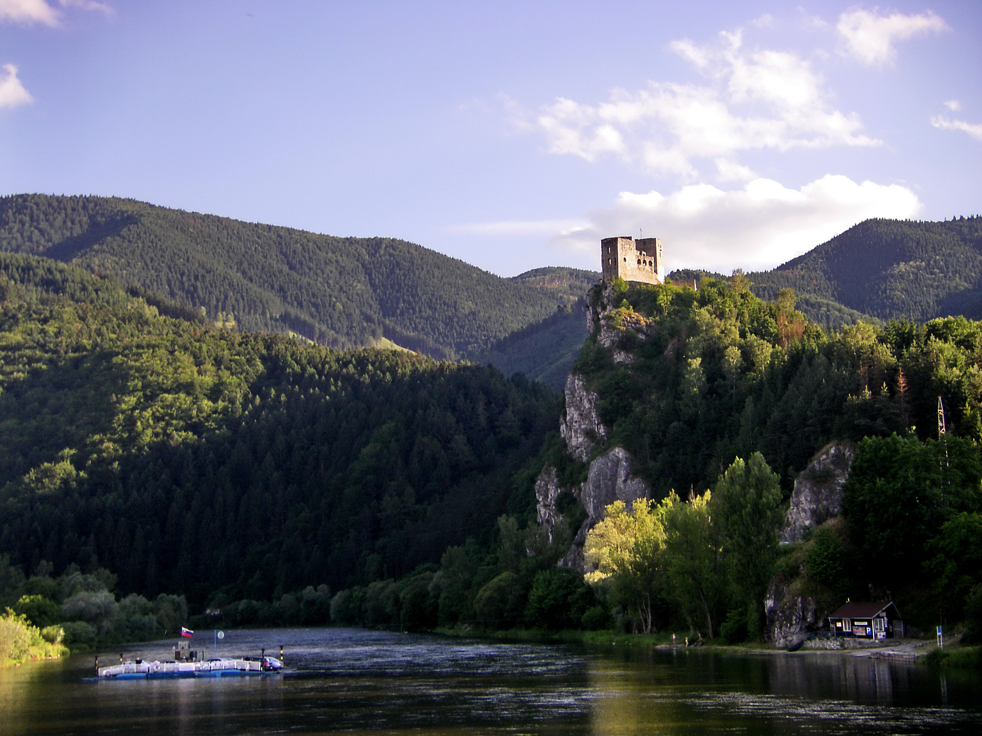 Palác hradný severný